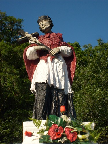 Oszczów - Św. Jan Nepomucen